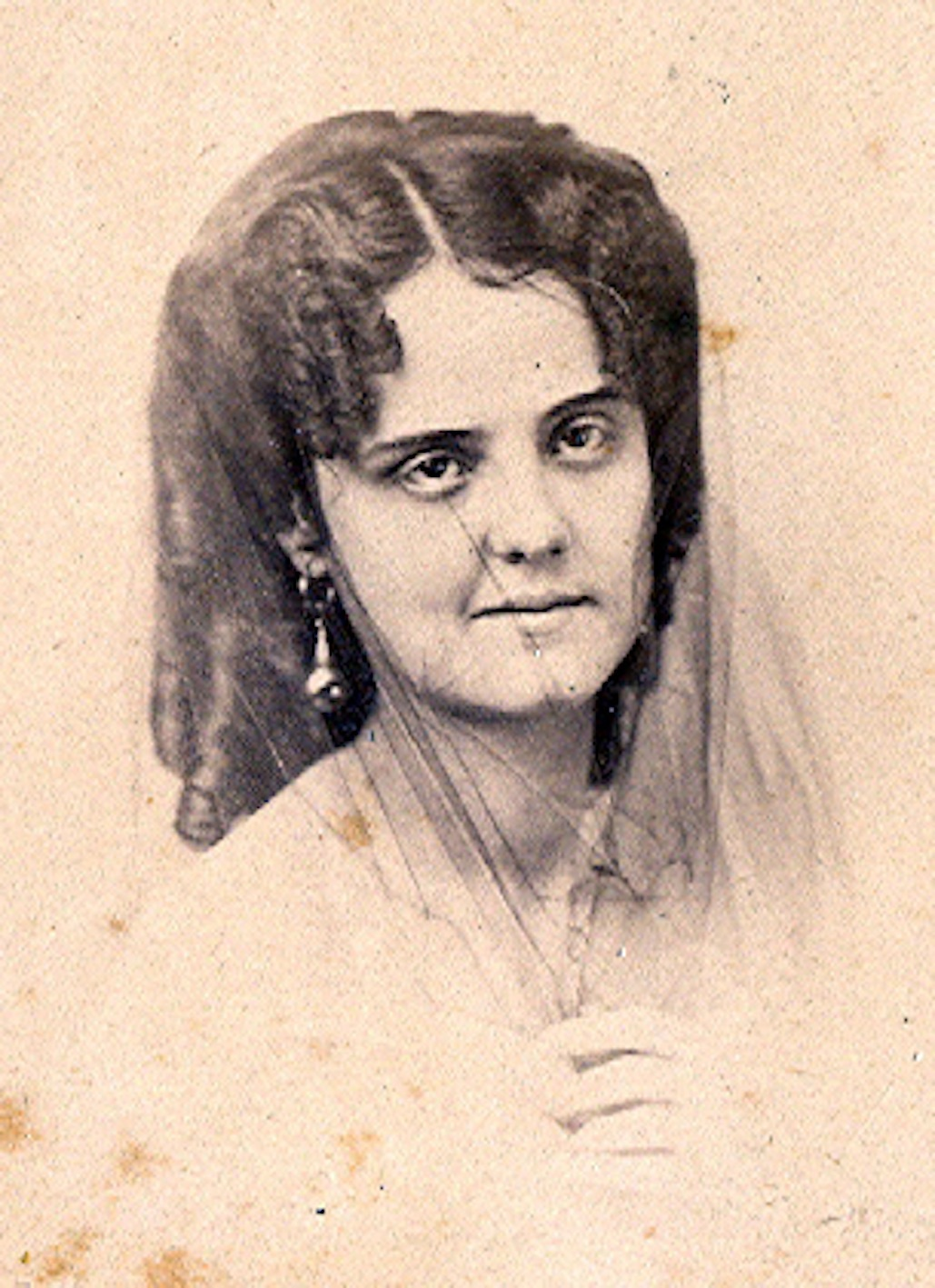 Filomena Tamarit e Ibarra, ca. 1884